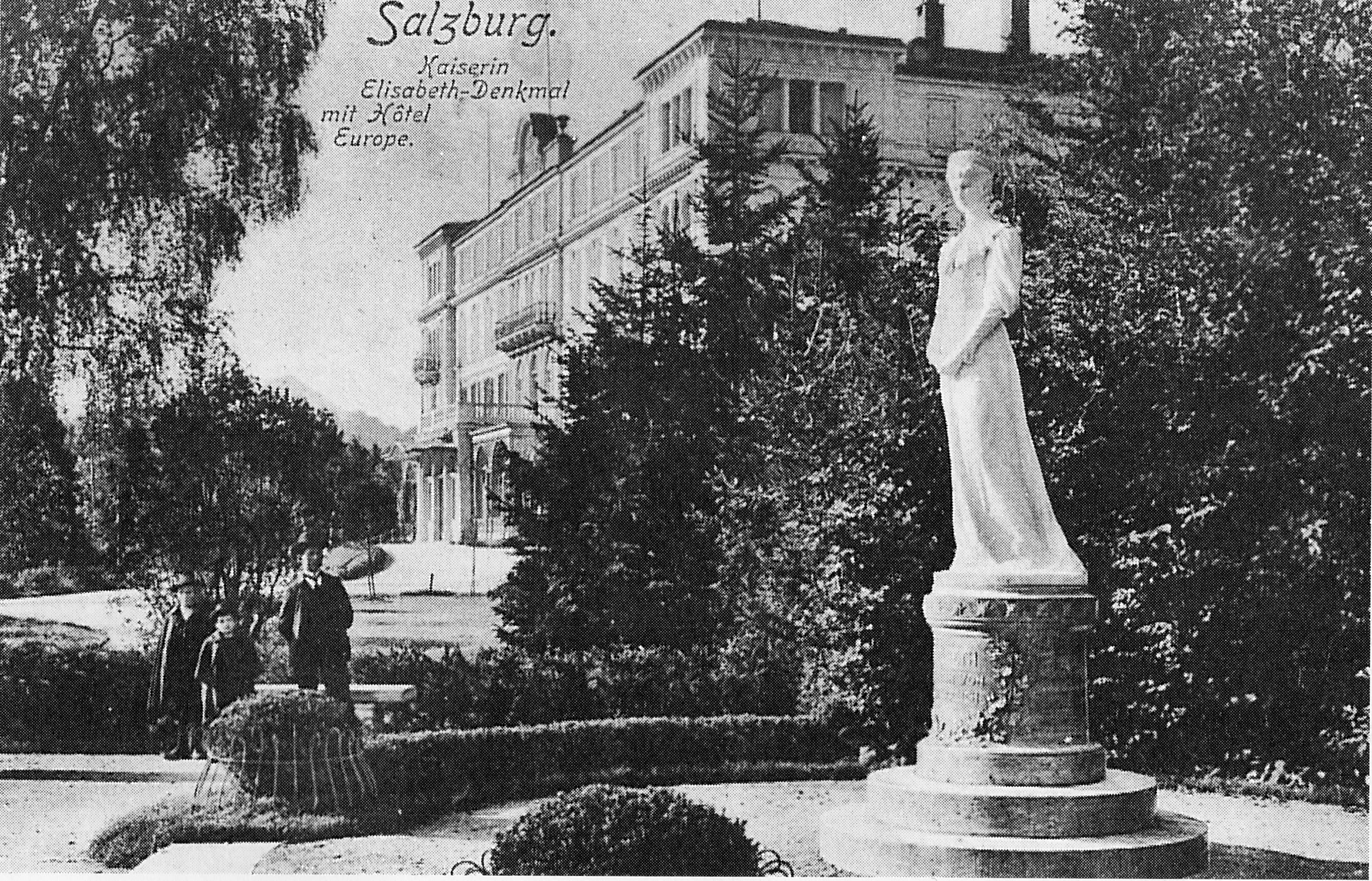 Kaiserin-Elisabeth-Denkmals in Salzburg ca. 1905 im Garten des damaligen Luxushotels Hotel de l'Europe nächst dem Salzburger Hauptbahnhof. Scan